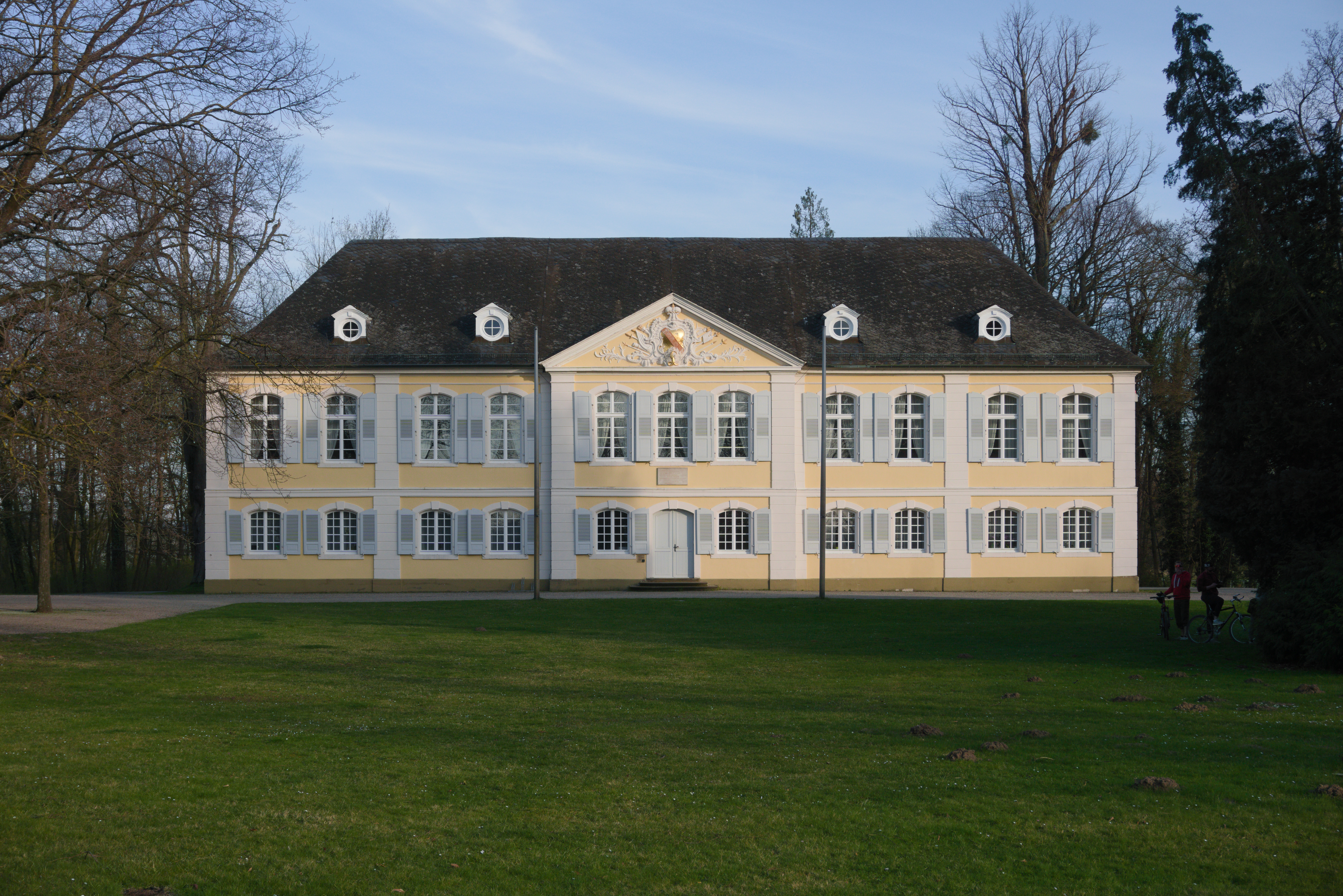 Schloss Stutensee